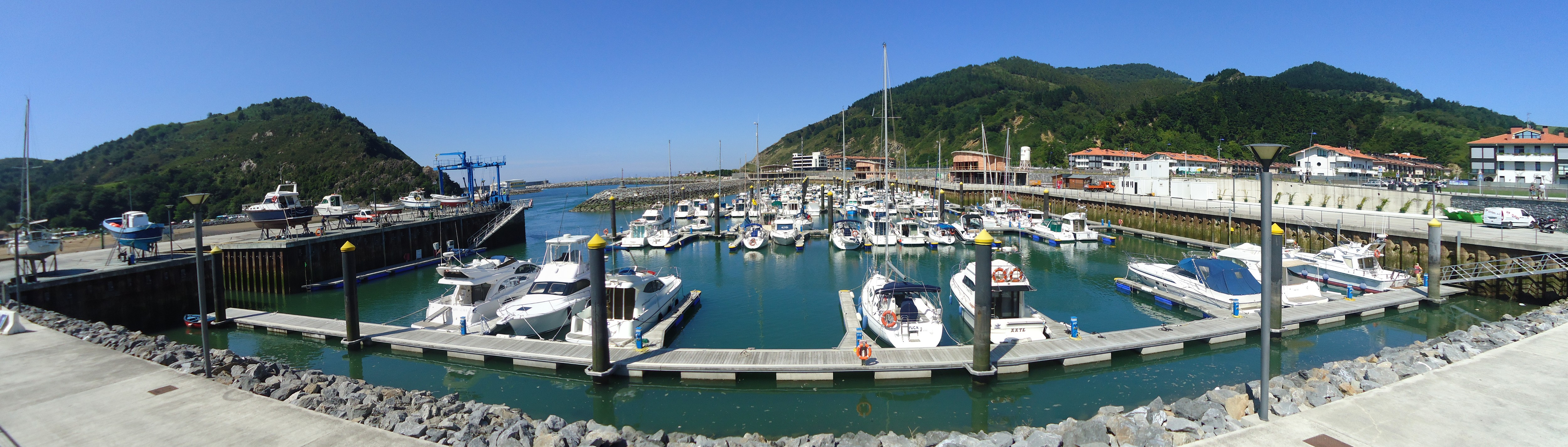 Orioko kirol portua (Gipuzkoa)